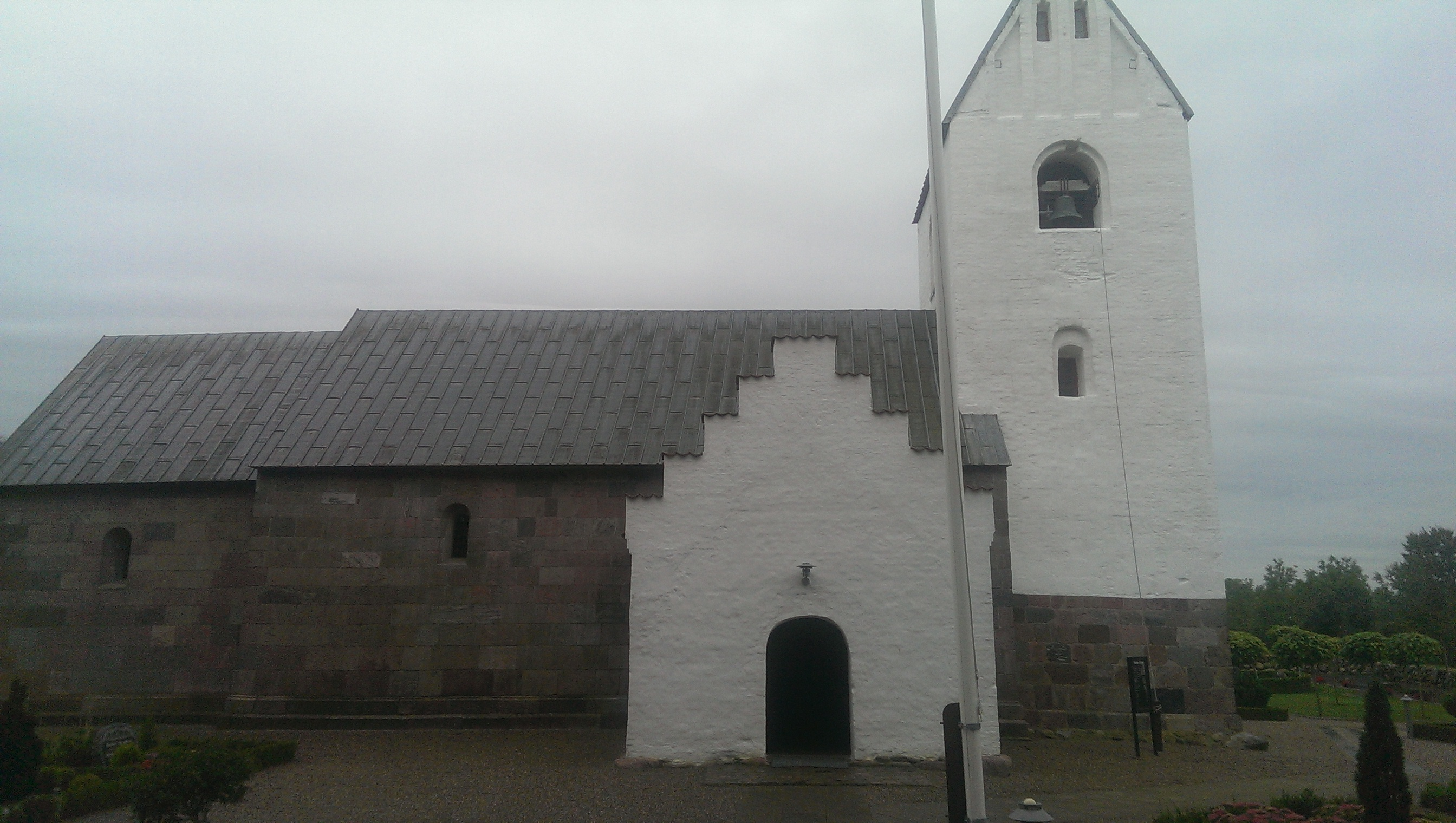 Vroue kirke